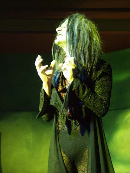 Theater